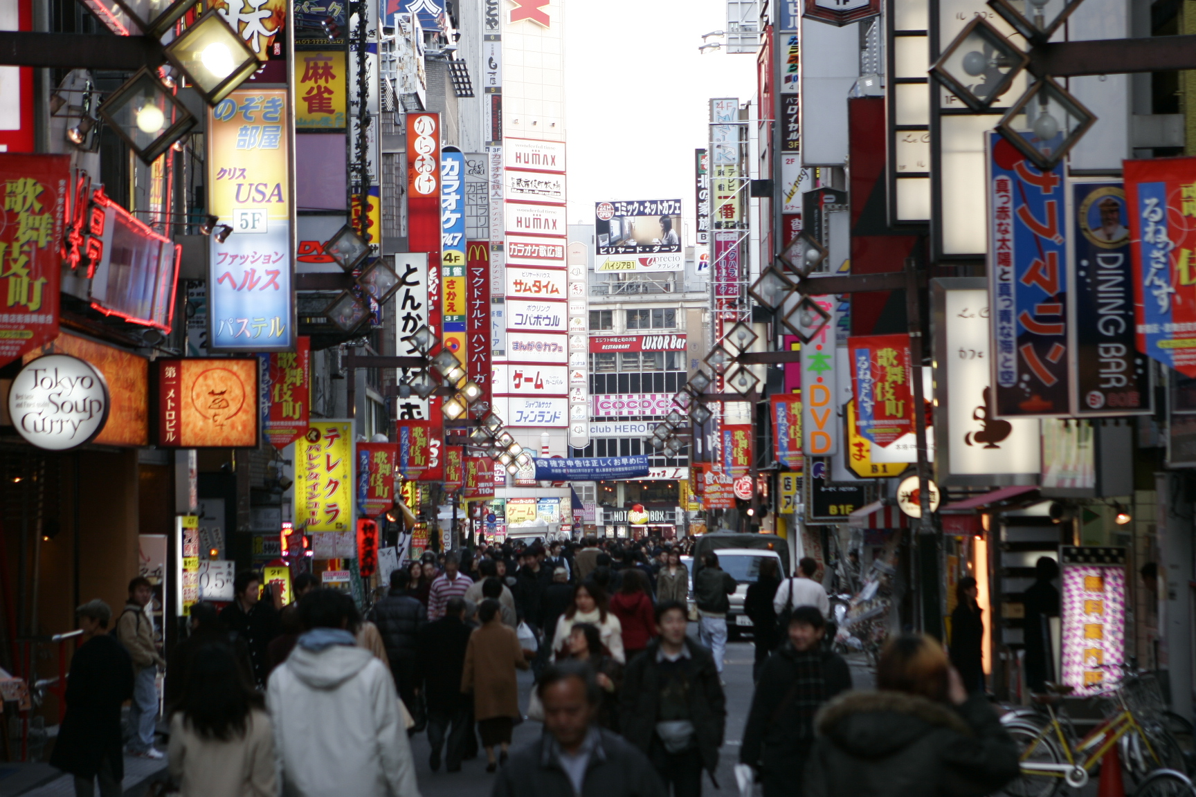 MAP